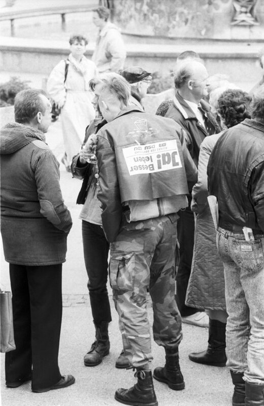 ADN-ZB Oberst 13.3.90 Berlin: Am 18. März wählt die DDR. Fragen und Probleme, die sich aus diesen ersten freien Wahlen ergeben, beschäftigen die Bürger. Die unterschiedlichsten Auffassungen prallen bei den zahlreichen Diskussionen - wie hier auf dem Alexanderplatz - aufeinander.